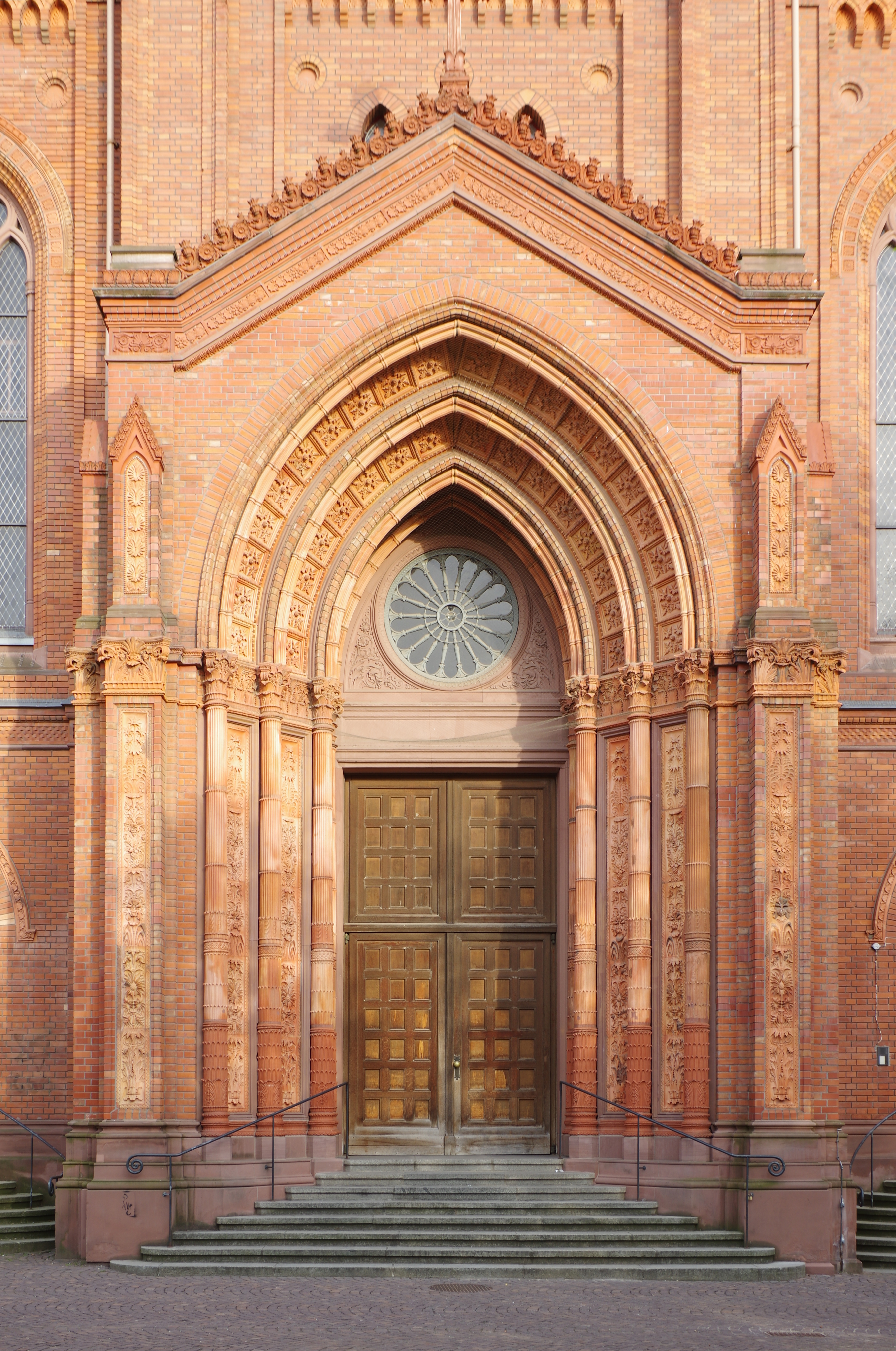 Deutschland, Wiesbaden, Marktkirche